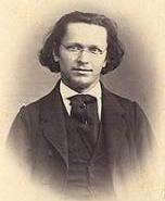 slovenský spisovateľ Gustáv Maršall-Petrovský